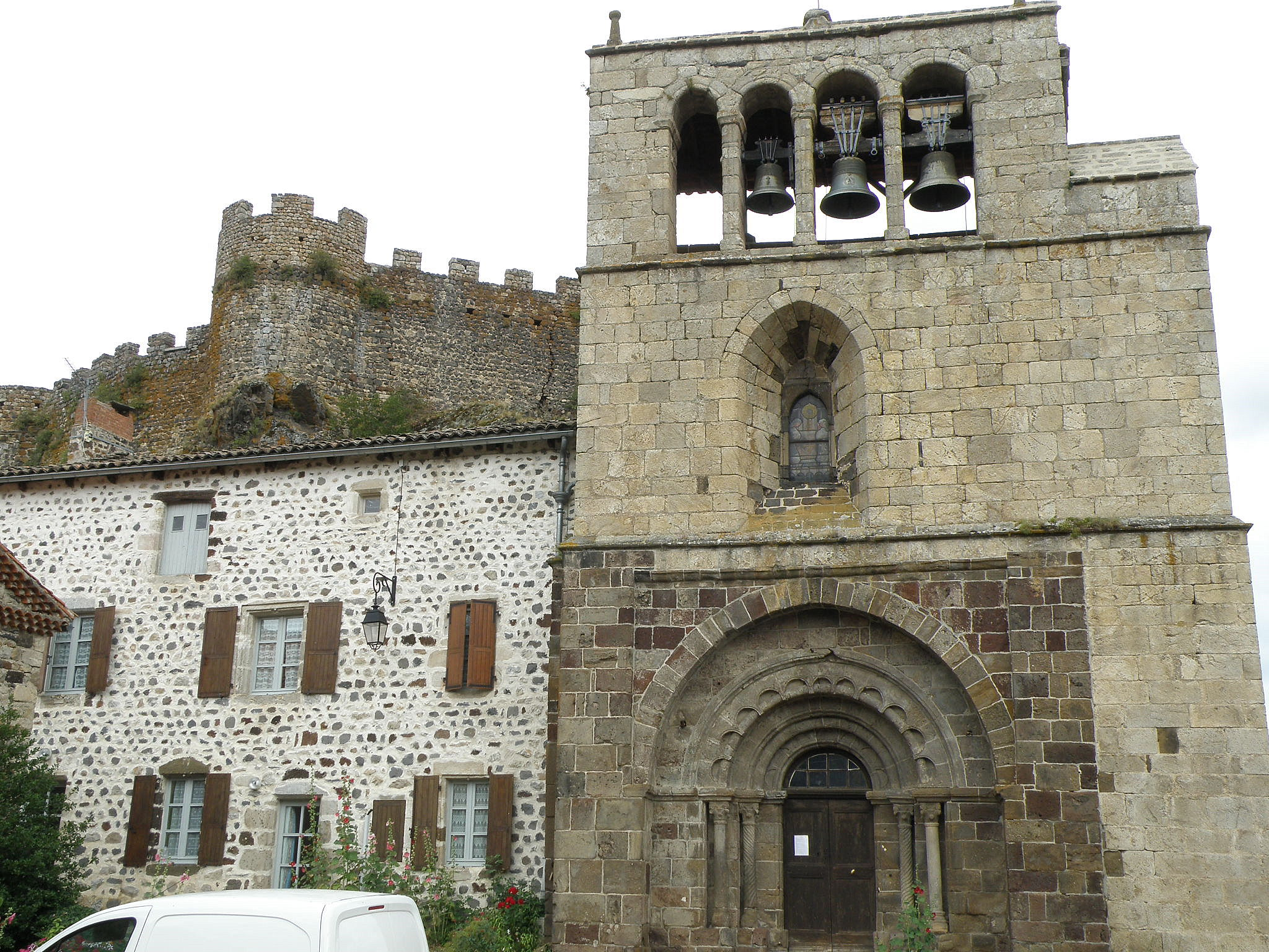 Arlempdes, comm. de la Haute-Loire, France (région Auvergne). Église Saint-Pierre, façade occidentale avec portail d'entrée et clocher à peigne. Remarquer l'archivolte polylobée et les colonnes torsadées. À l'arrière-plan à gauche : tour d'angle ouest, courtine sud-ouest (à droite de la tour d'angle) et partie nord-ouest (à gauche de la tour d'angle) de la muraille d'enceinte du château.